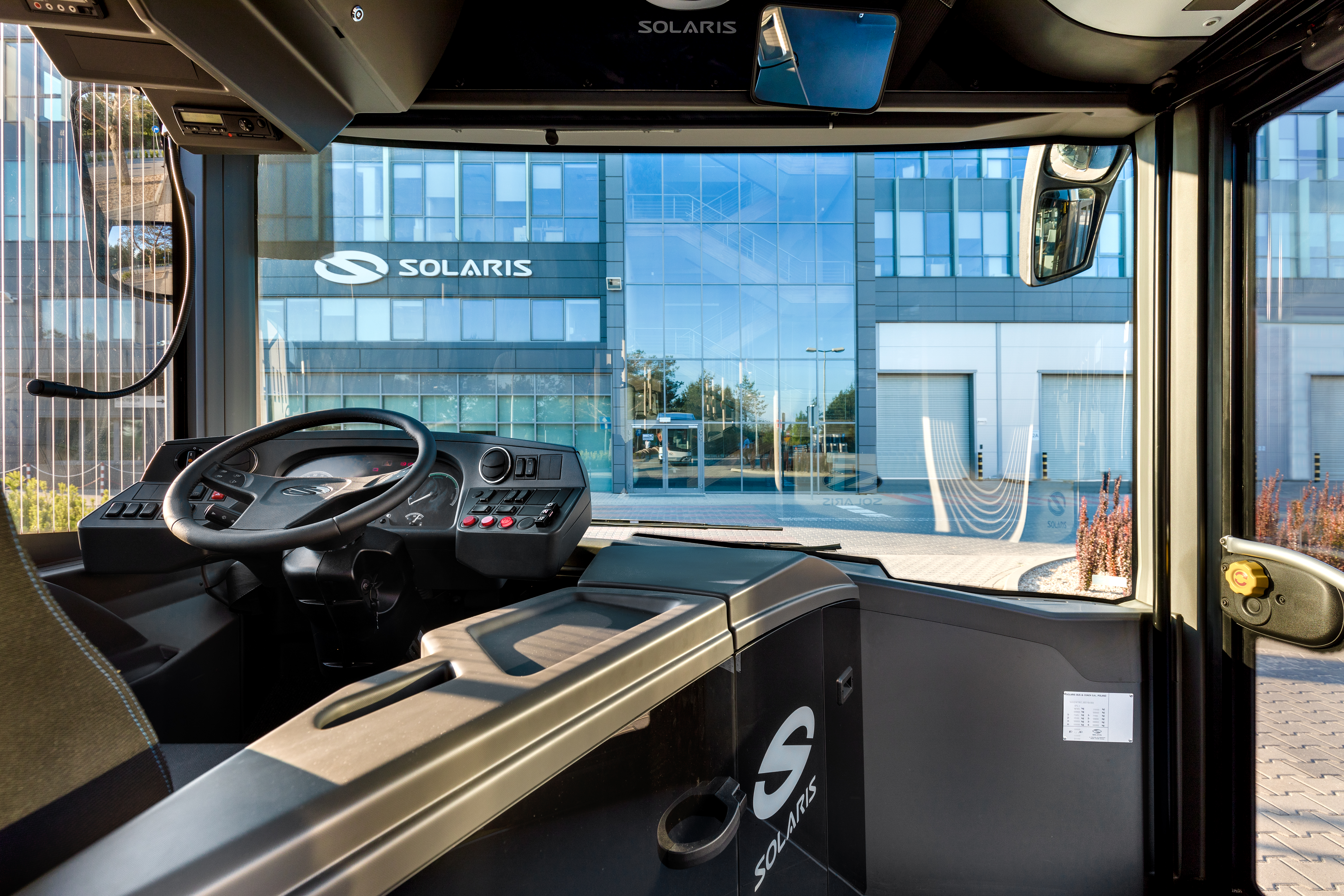 Solaris Urbino 12 hydrogen